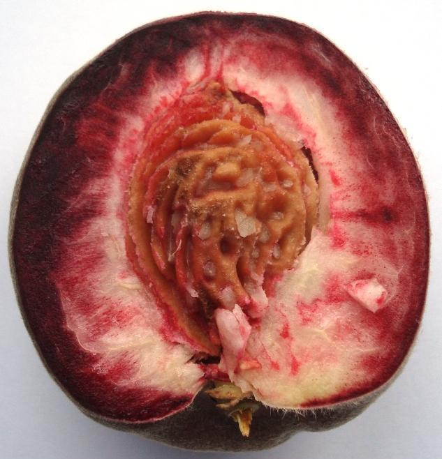 Pfirsich: Weinbergpfirsch - halbiert